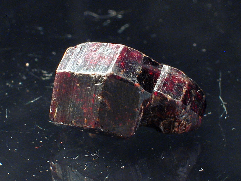 rutyl, pochodzenie Madagaskar; autor zdjęcia Stowarzyszenie Spirifer